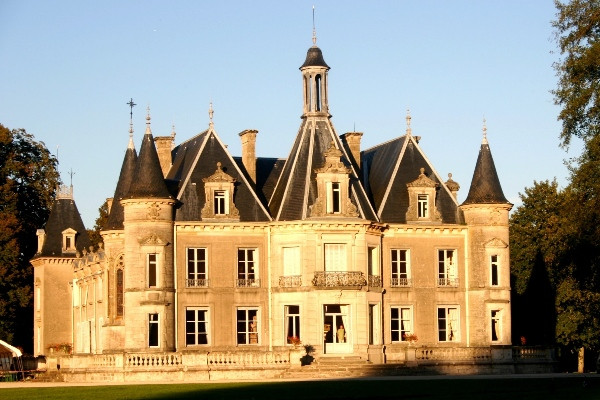 Le château de Thillombois Auteur: Beideler René